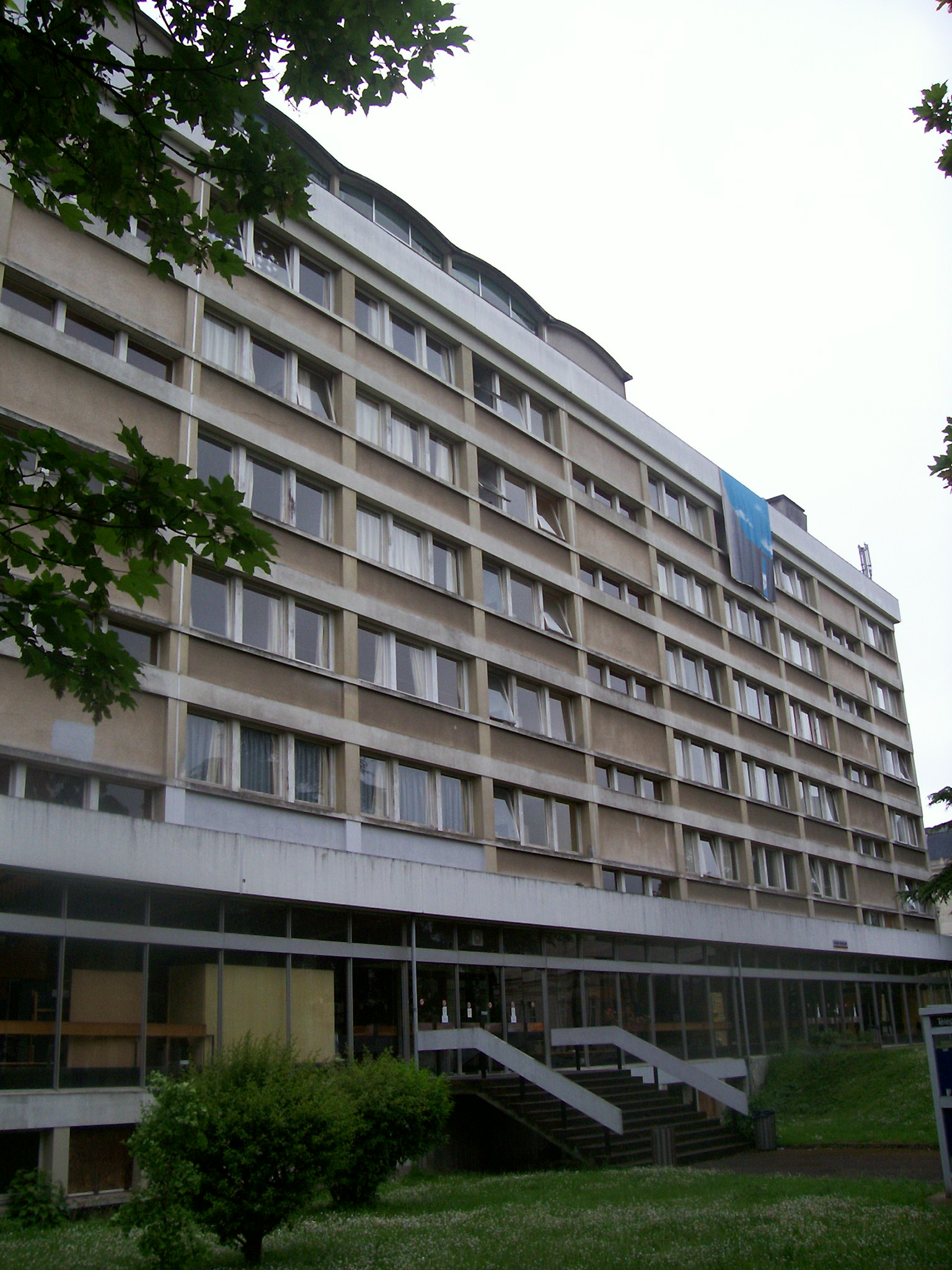 Batiment de l'IPLV sur le campus de L'UCO à Angers